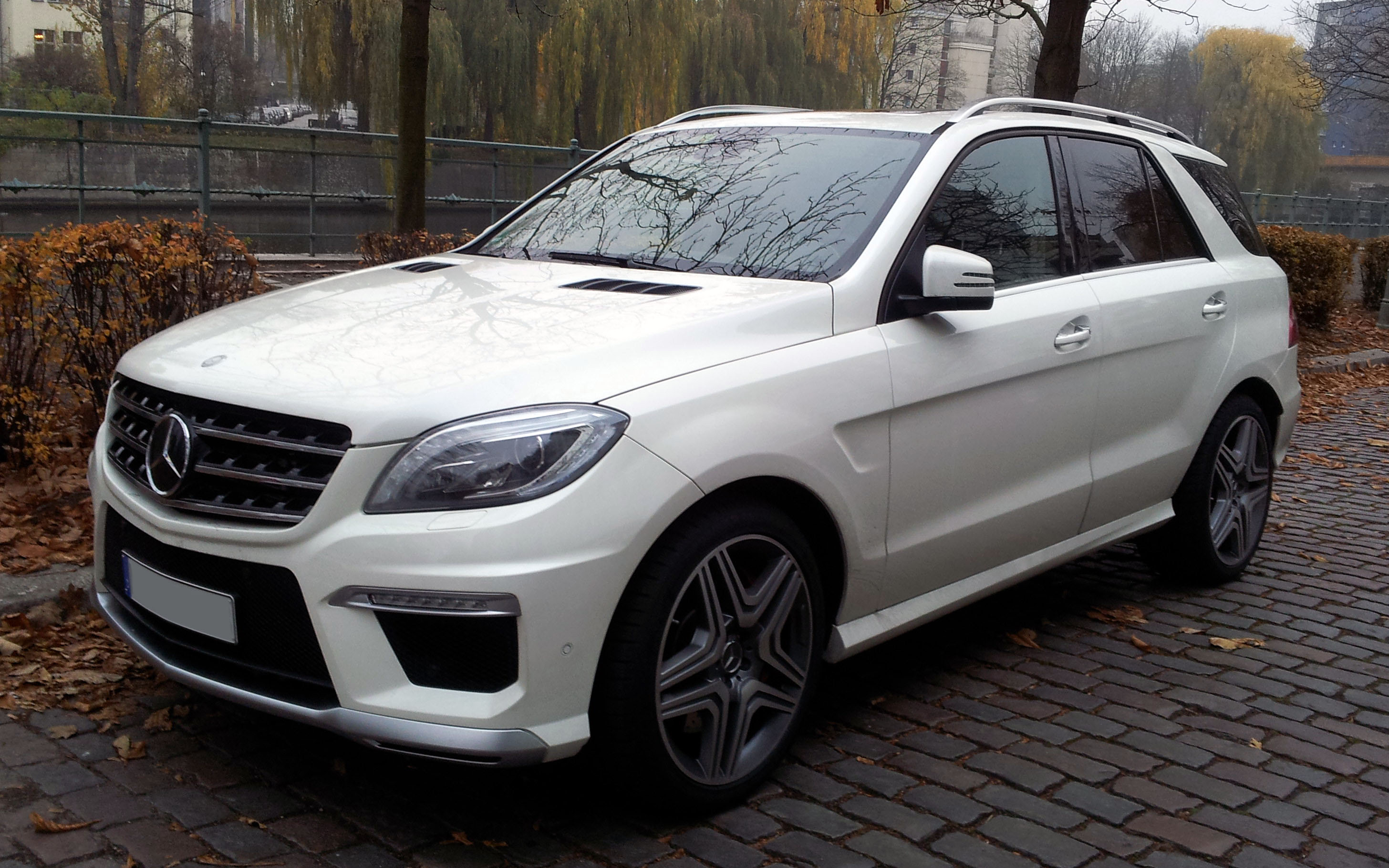 Mercedes-Benz ML 63 AMG V8 Biturbo